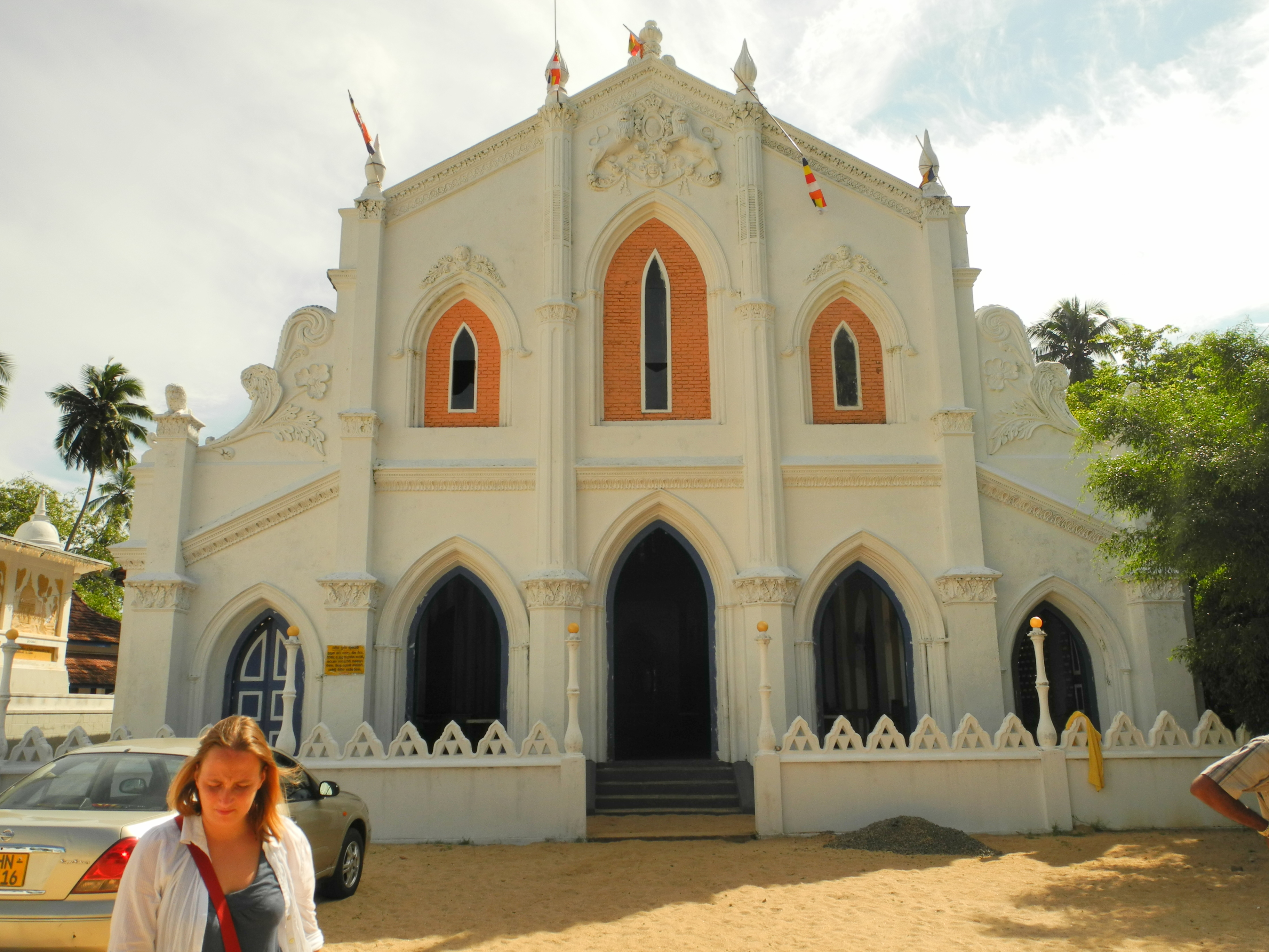 Sri Lanka 2010-11